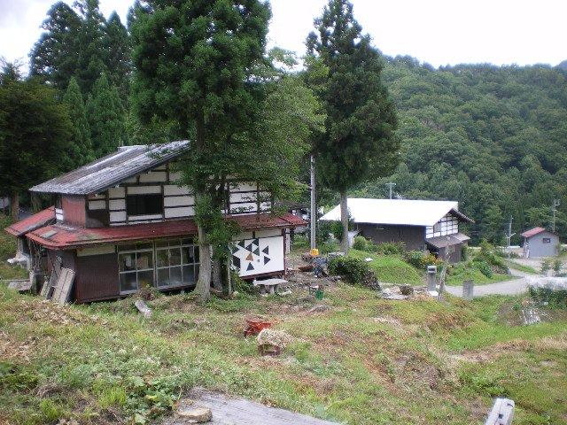 高山建築学校の本部校舎１